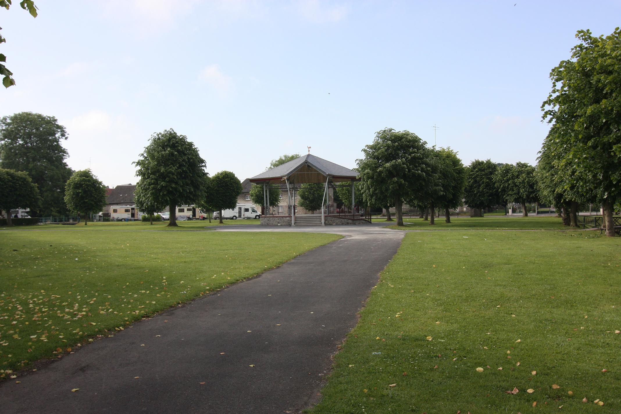 Le nouveau kiosque sur la place principale de LEVAL - remis à la place de l'ancien